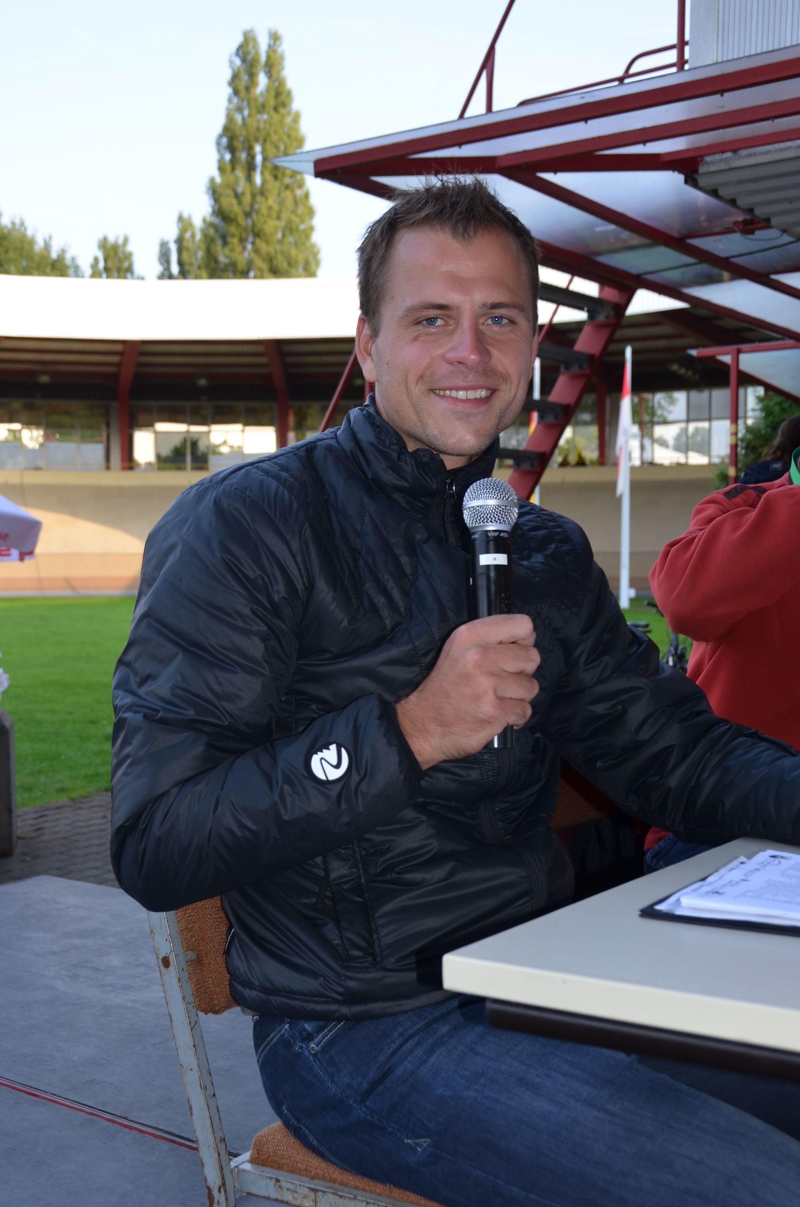 Robert Bengsch, ehemaliger deutscher Bahnradsportler The making of this document was supported by the Community-Budget of Wikimedia Germany.